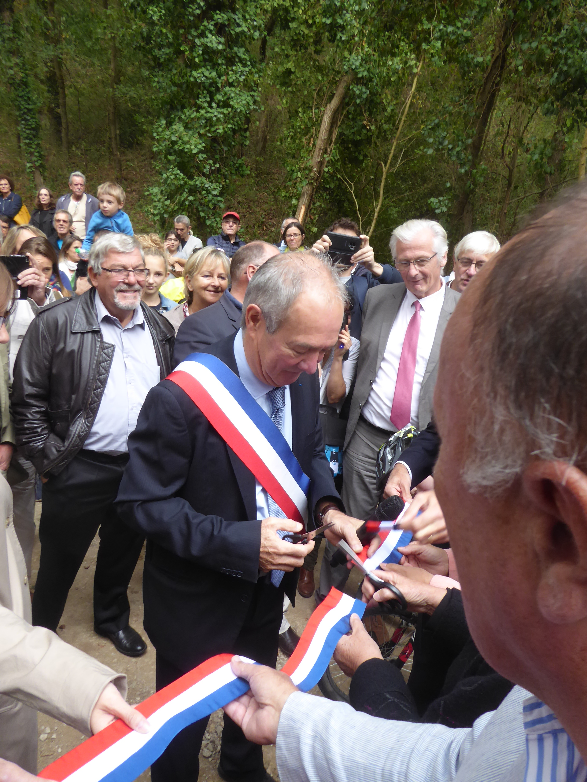 Inauguration du prolongement de la voie verte de l'aérotrain à Bonnelles. Ruban coupé